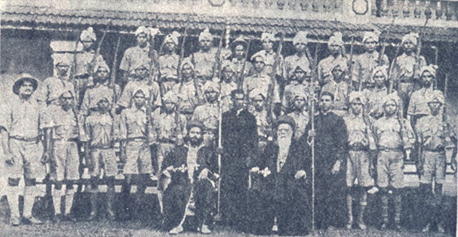 കുന്ദംകുളസന്ദർശനവേളയിൽ അവിടത്തെ നസ്രാണിയോദ്ധാക്കൾ മലങ്കരമെത്രാപ്പോലീത്തയ്ക്കു് നല്കിയ ഗാര്ഡ് ഓഫ് ഓണർ. 2001 ഒക്ടോബർ ലക്കം മലങ്കര സഭാ മാസികയിൽ അഡ്വ. പിസിമാത്യു പുലിക്കോട്ടിൽ സമ്പാദിച്ചു് പുനഃപ്രസിദ്ധീകരിച്ചതു്.